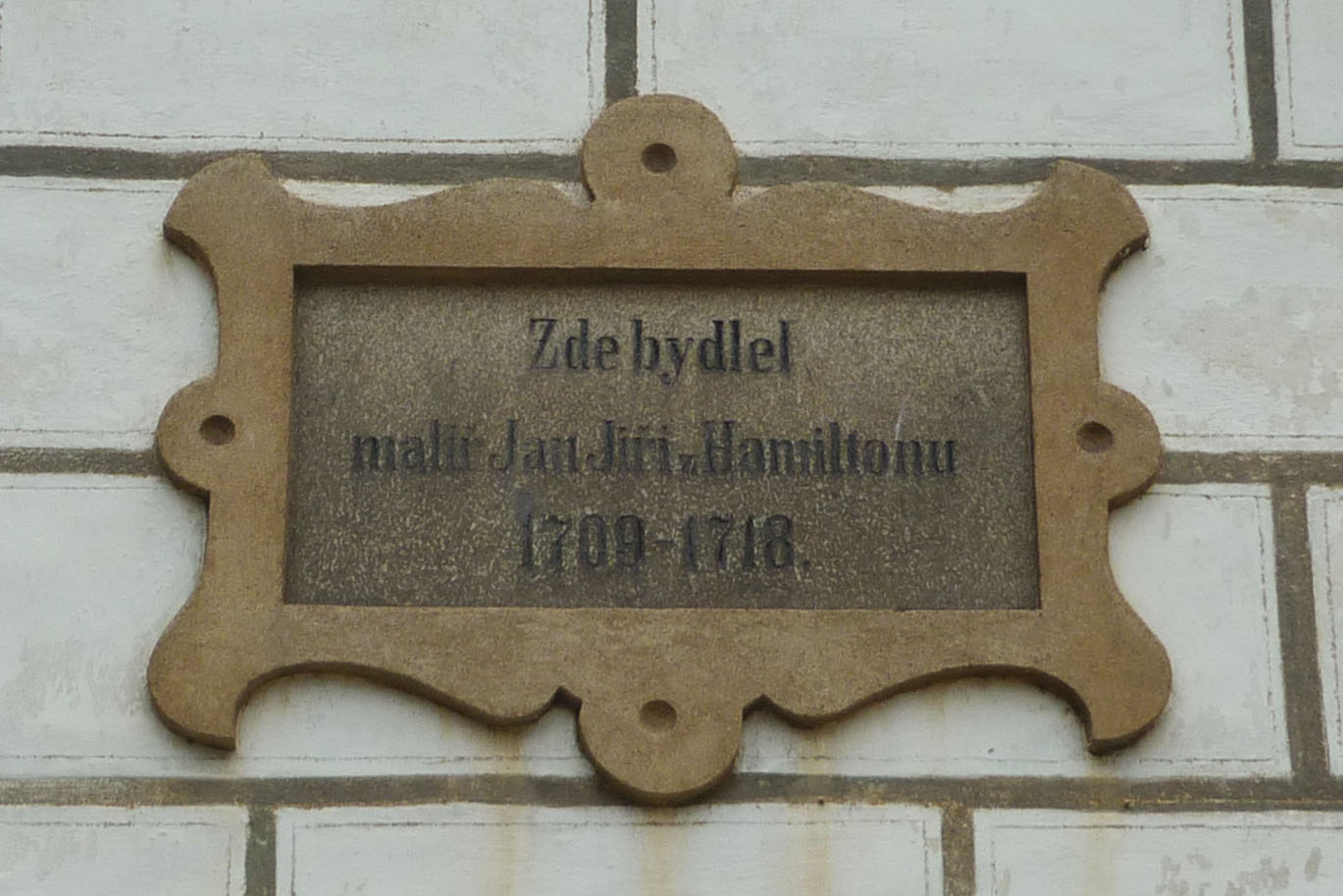 Gedenktafel an den Maler Hamilton im Schlosshof von Wittingau / Třeboň